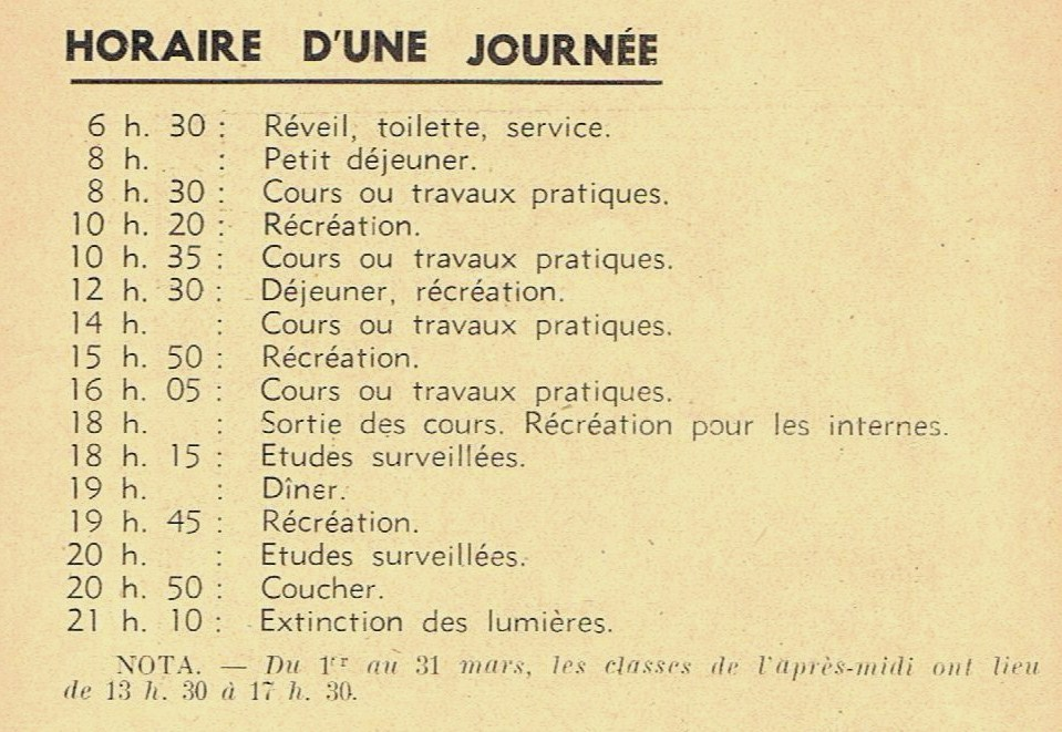 Horaire journalier de la scolarité du centre d'apprentissage Georges Lamarque à Nice (Alpes Maritimes)